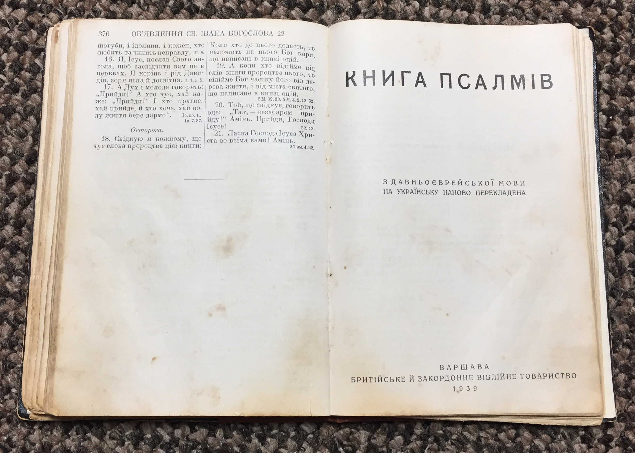 Розворот Нового Завіту з книгою Псалтир 1939 року, у перекладі Івана Огієнко